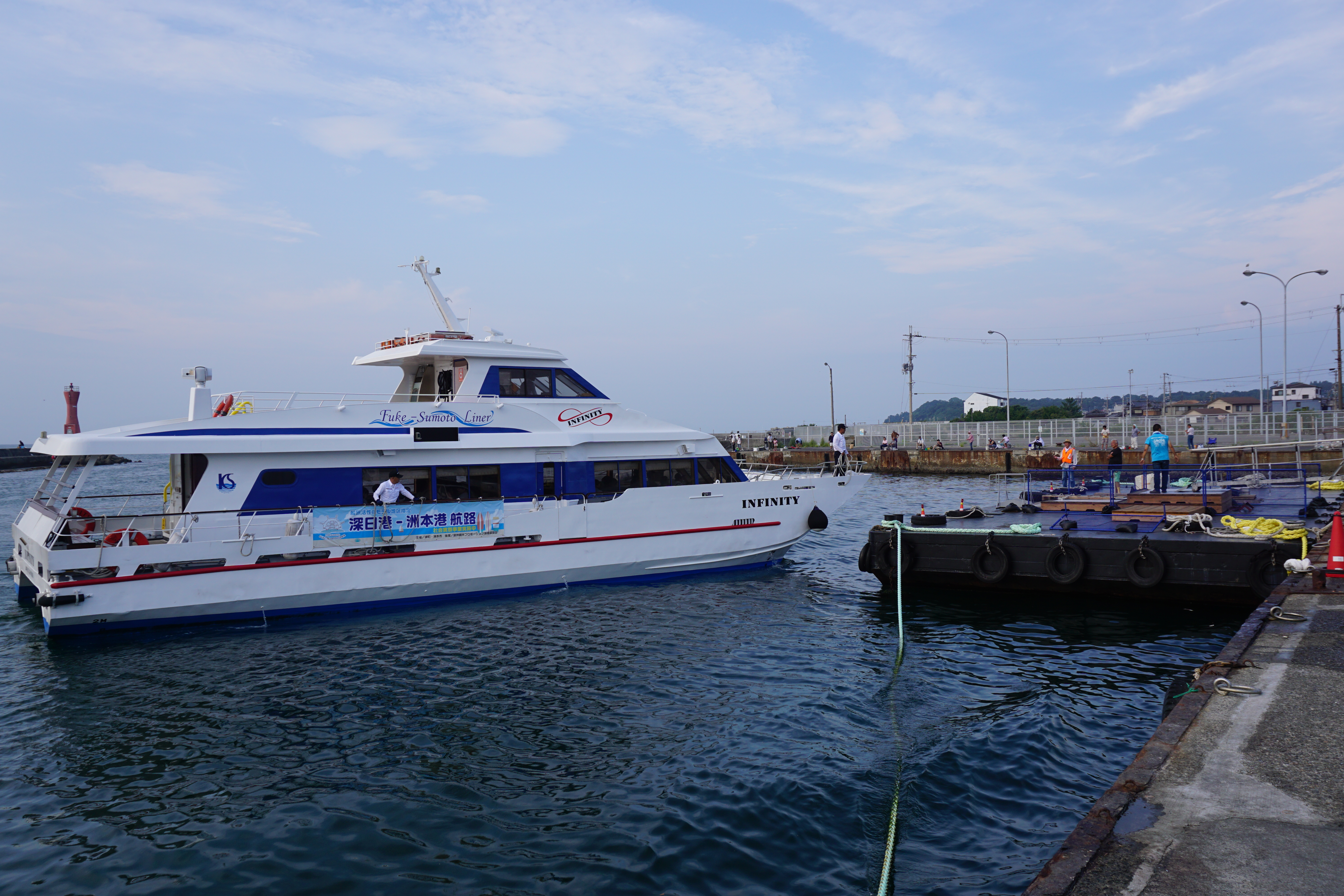 深日港に着岸する船舶（深日港-洲本港間で試験航行されている航路）